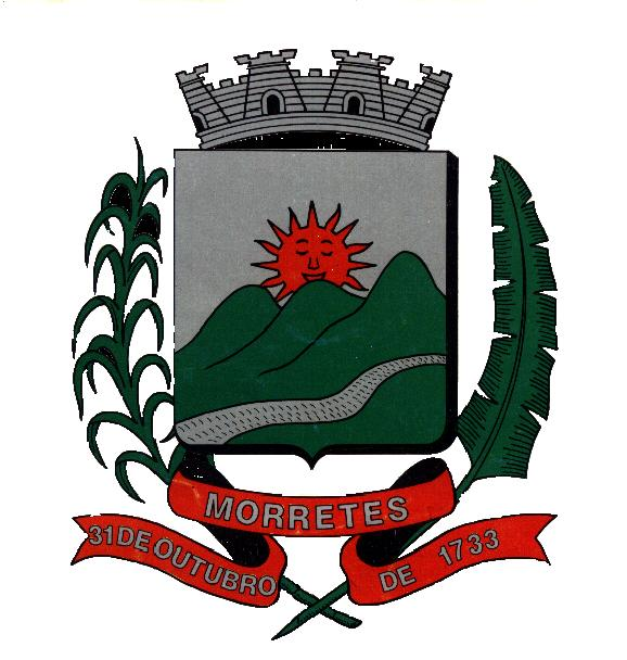 Brasão do Município Morretes